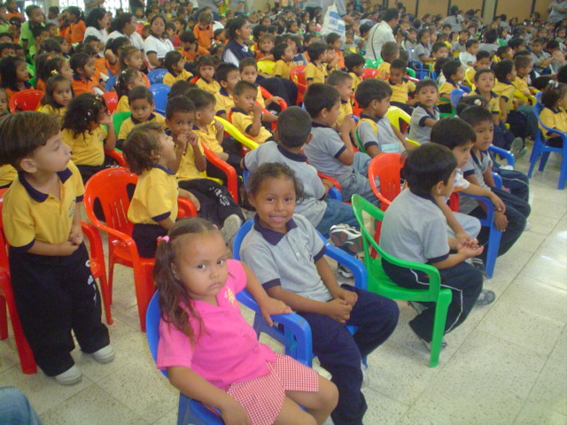 Programa ZUMAR - Día del Niño en el salón de reuniones del Centro Polifuncional Lugar: Bastión Popular Ciudad: Guayaquil - Ecuador Autor: Equipo de trabajo del Programa Fecha: 2002 - 2006